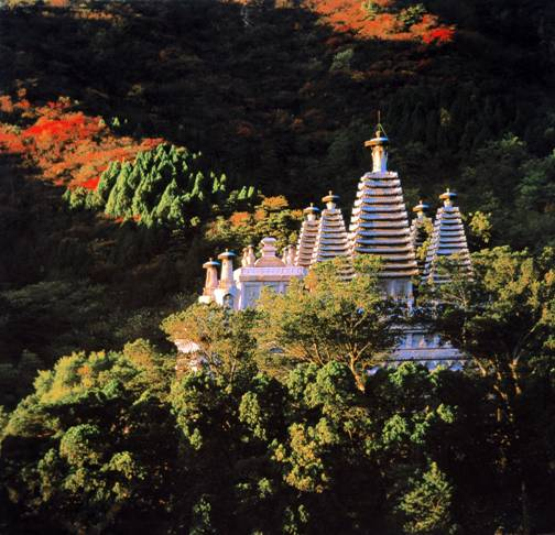 香山碧云寺金刚宝座塔